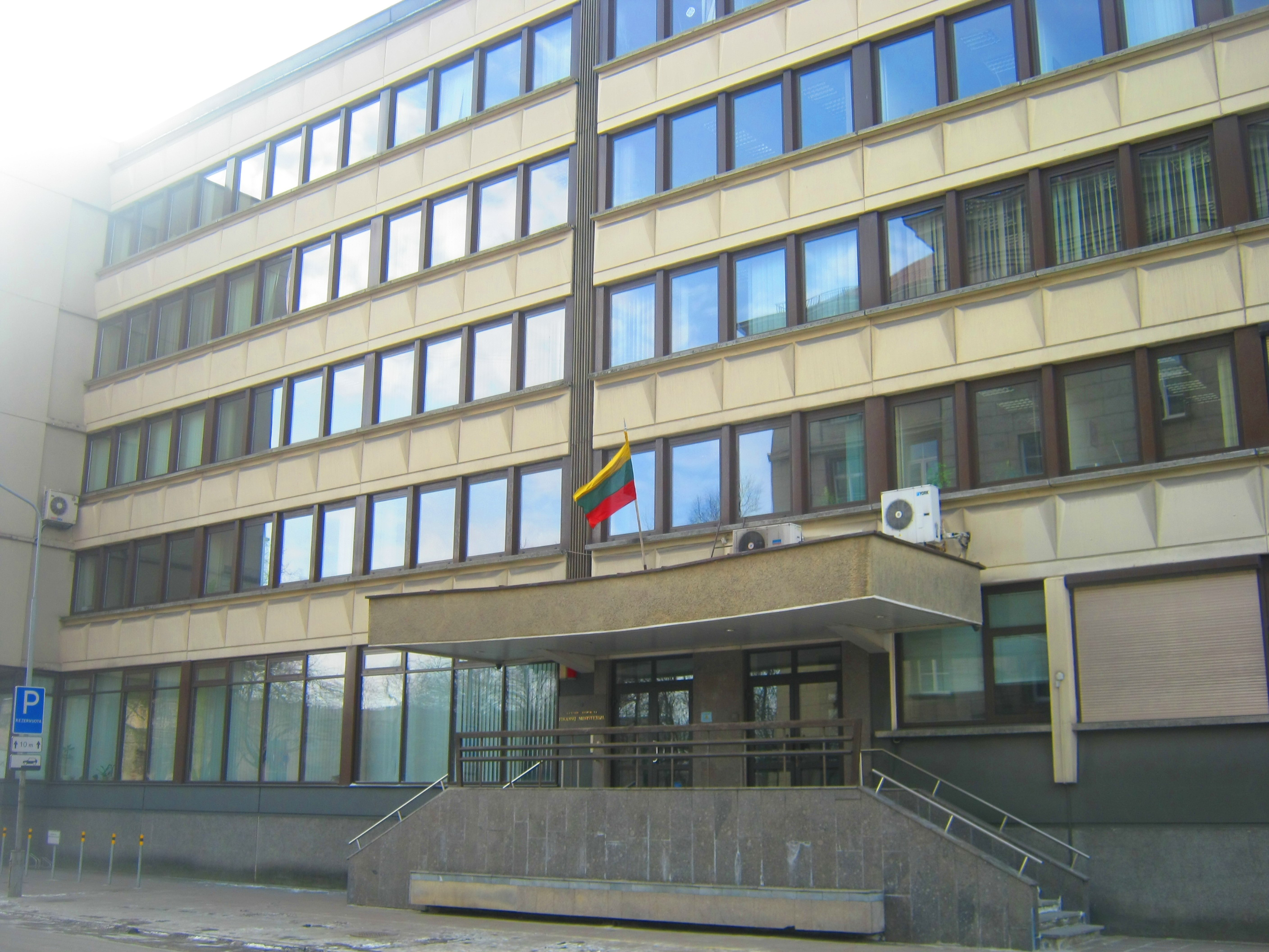 Vilnius